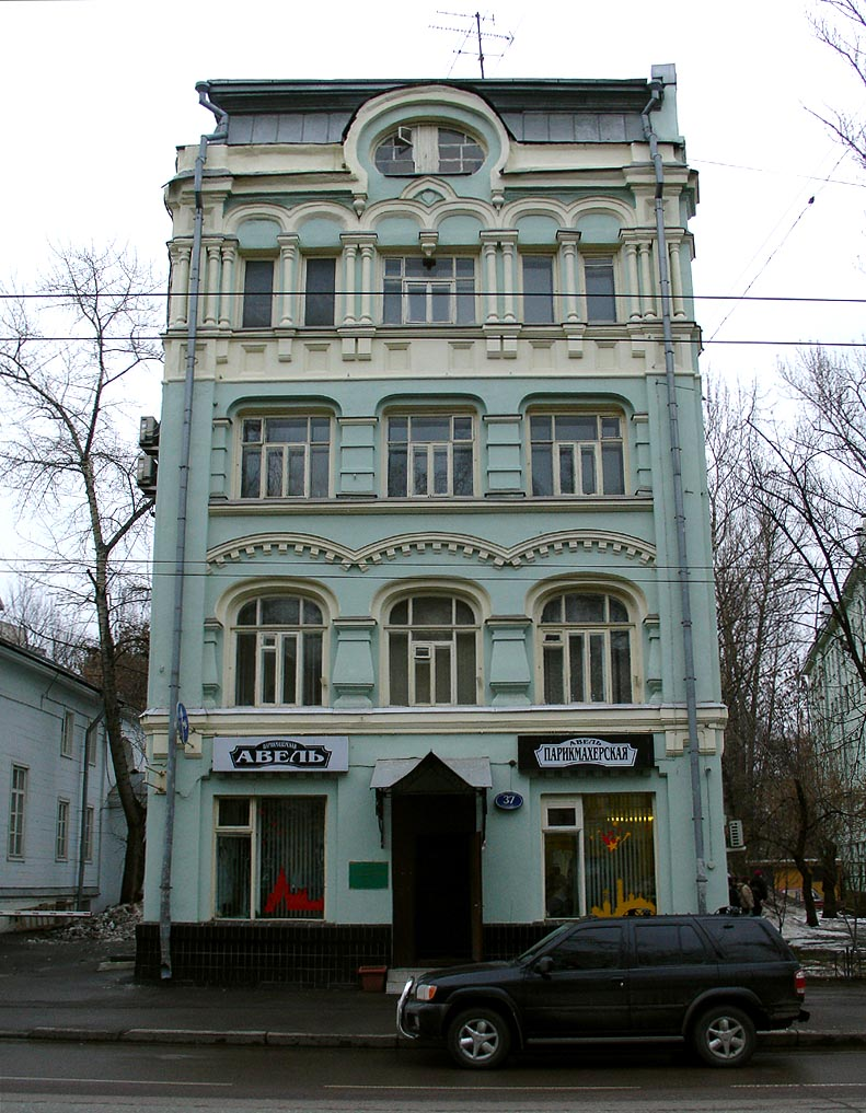 Art Nouveau Building, 39 Ostozhenka, Moscow, Russia.